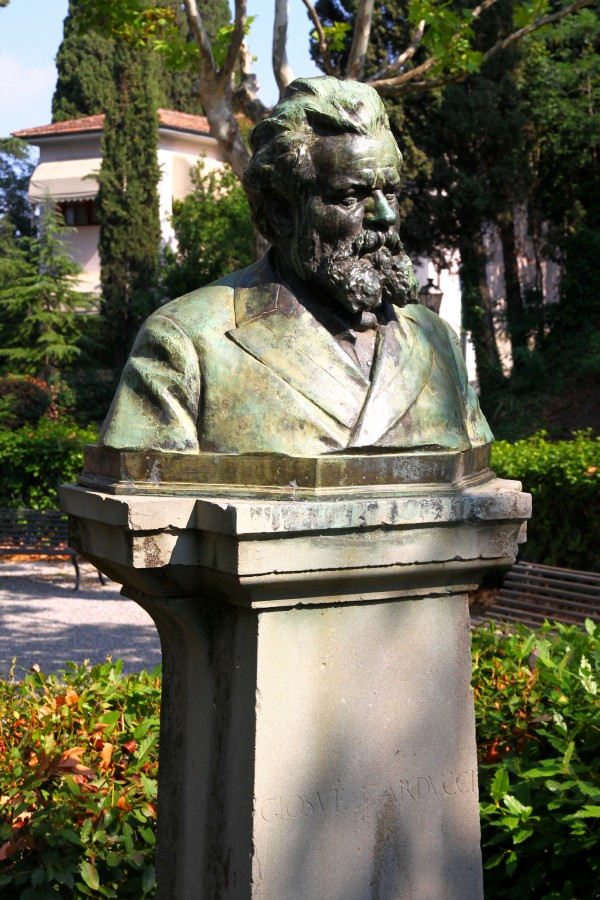 Monumento a Giosuè Carducci a San Miniato giardinetti vicino a piazza Dante